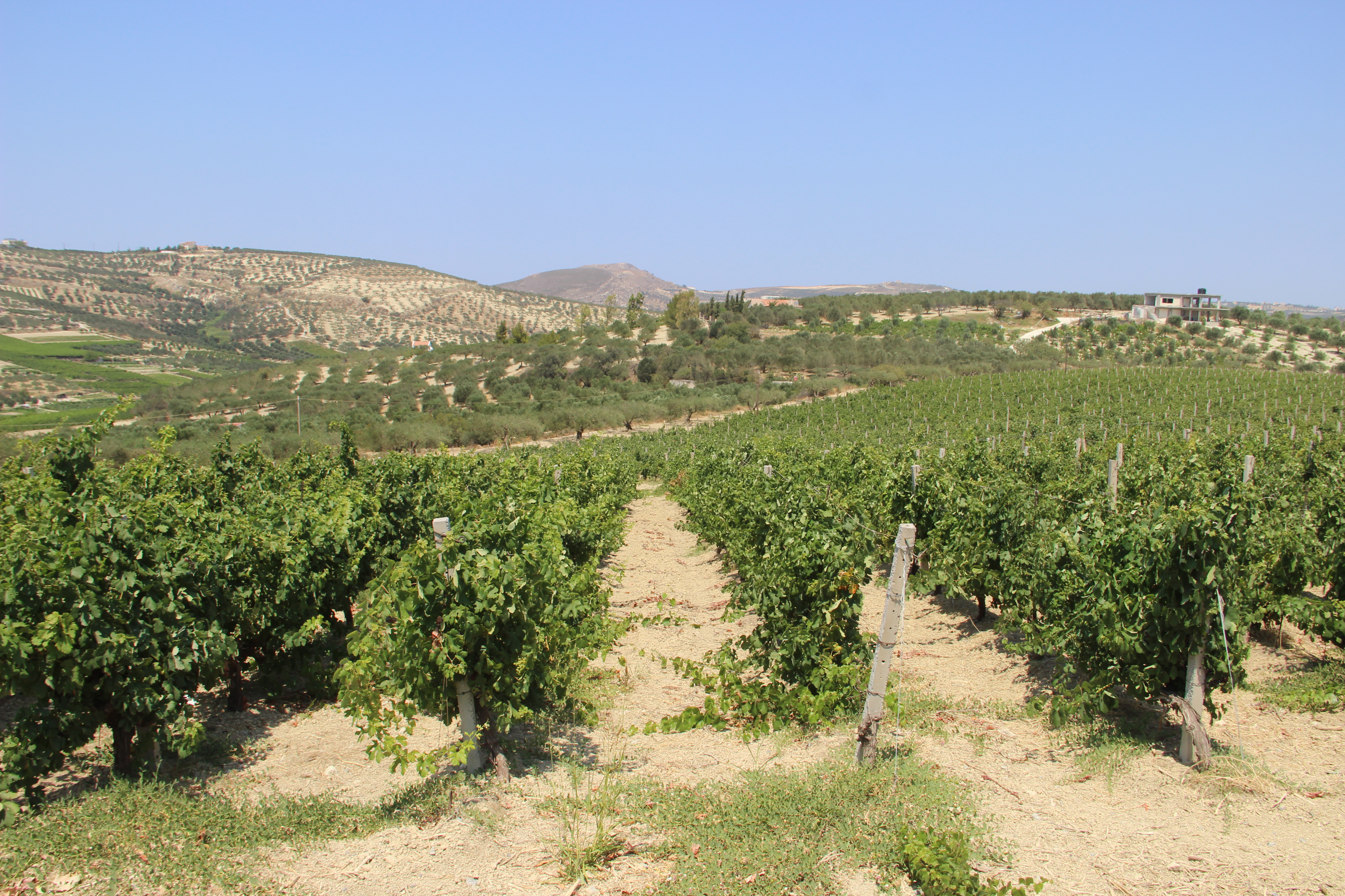 Сорта винограда. Виноградники Boutari. Skalani. Iraklion. Crete. Creece. Июнь 2013